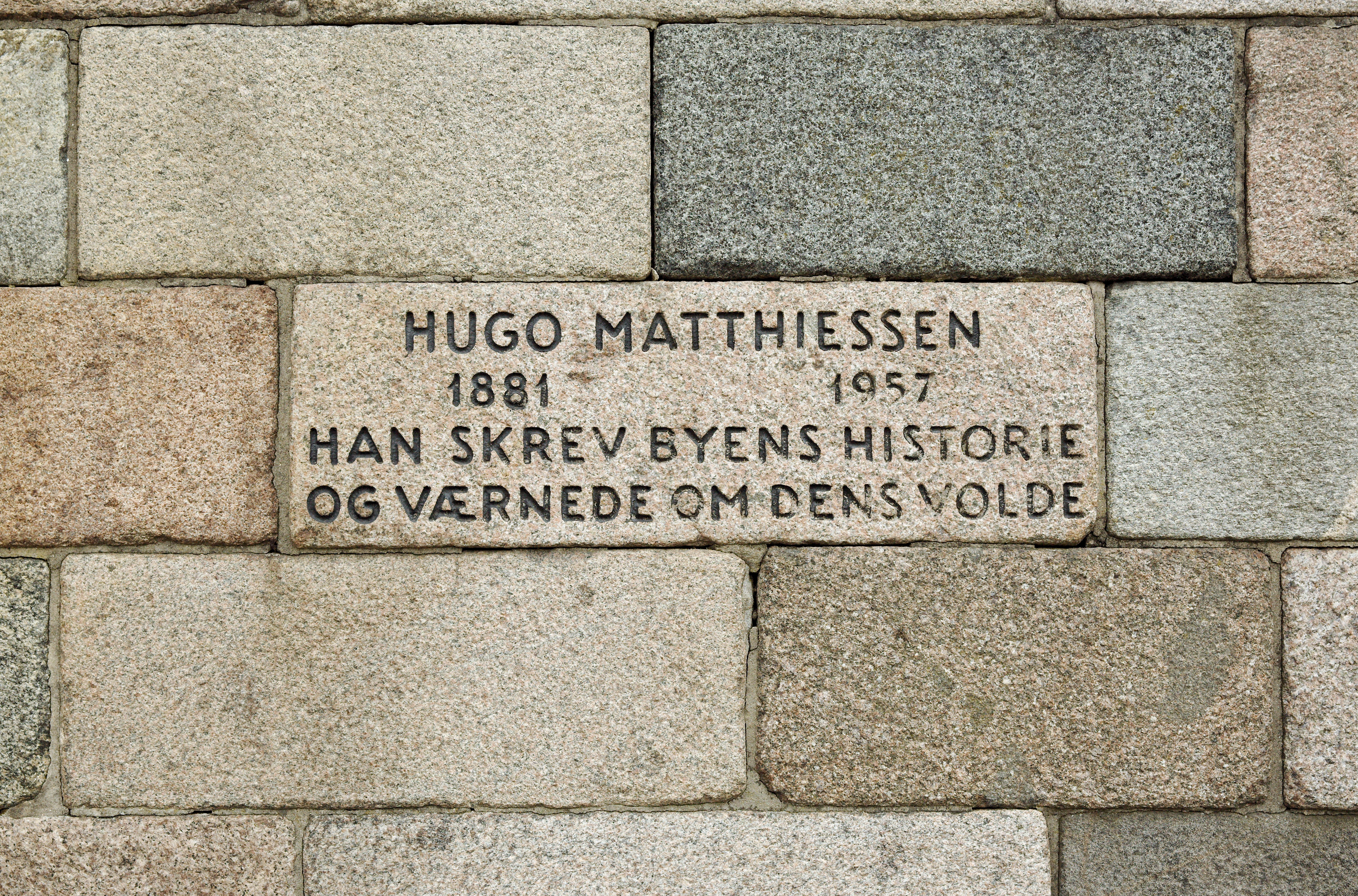 Hugo Matthiessen mindeord i Prinsens Port i Fredericia